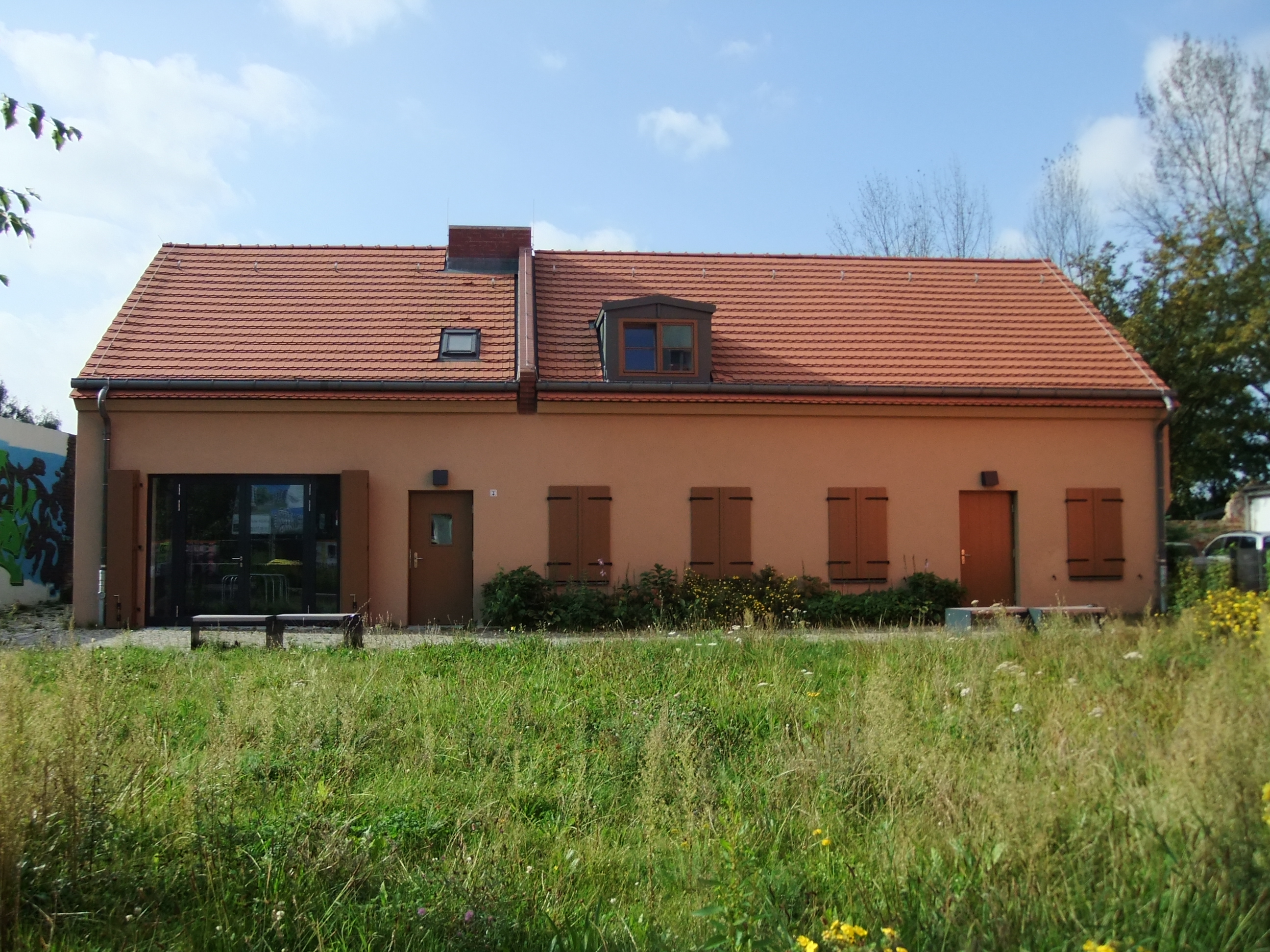 Denkmalliste Berlin 09040180 - Berlin Rummelsburg Lückstraße 18, Kolonistenhaus, 1789 (Bestandteile des Ensembles Lückstraße 18-20 Denkmalliste Berlin 09040179)